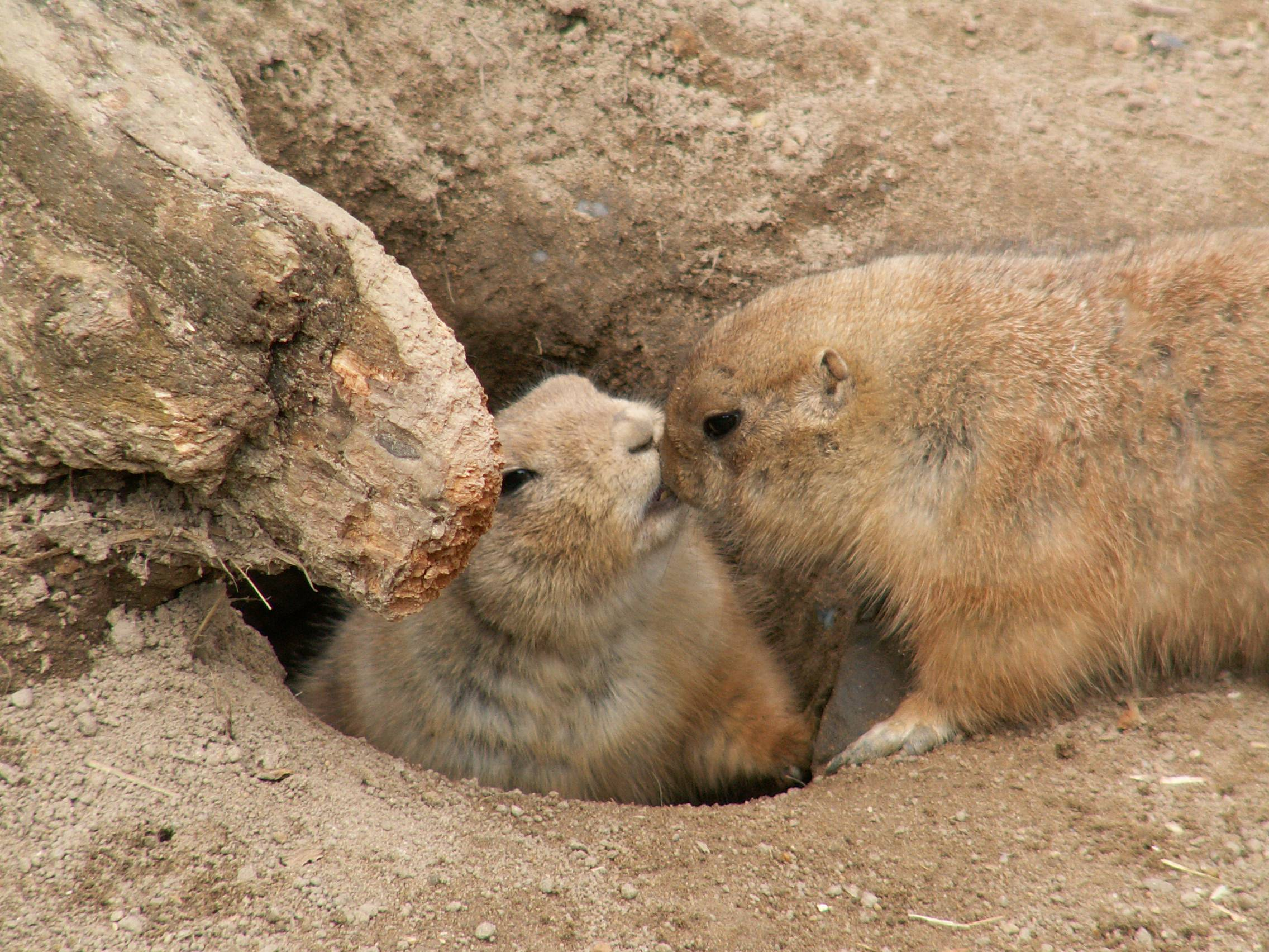 Cynomys, Präriehund, aufgenommen in Hagenbecks Tierpark, Hamburg, Deutschland.